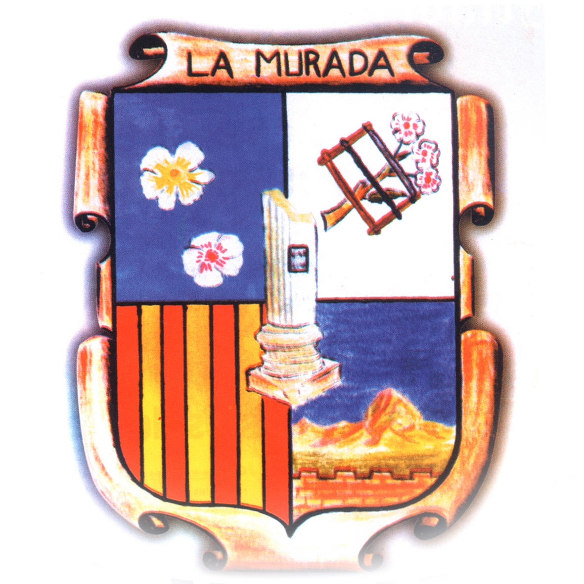 bandera de la pedania oriholana La Murada